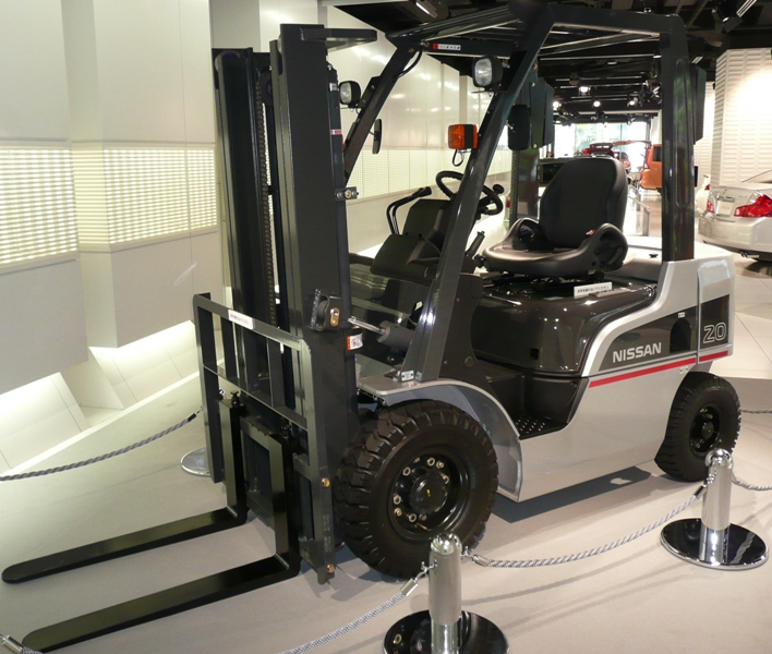 Nissan Agres.